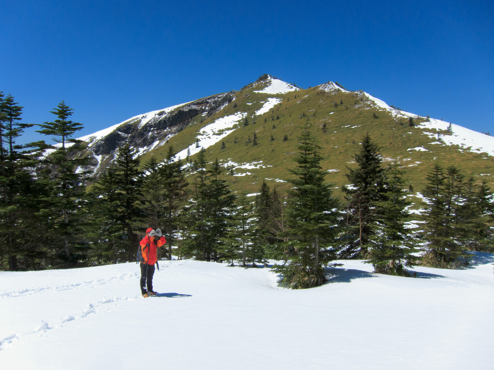 根子岳を南東から。